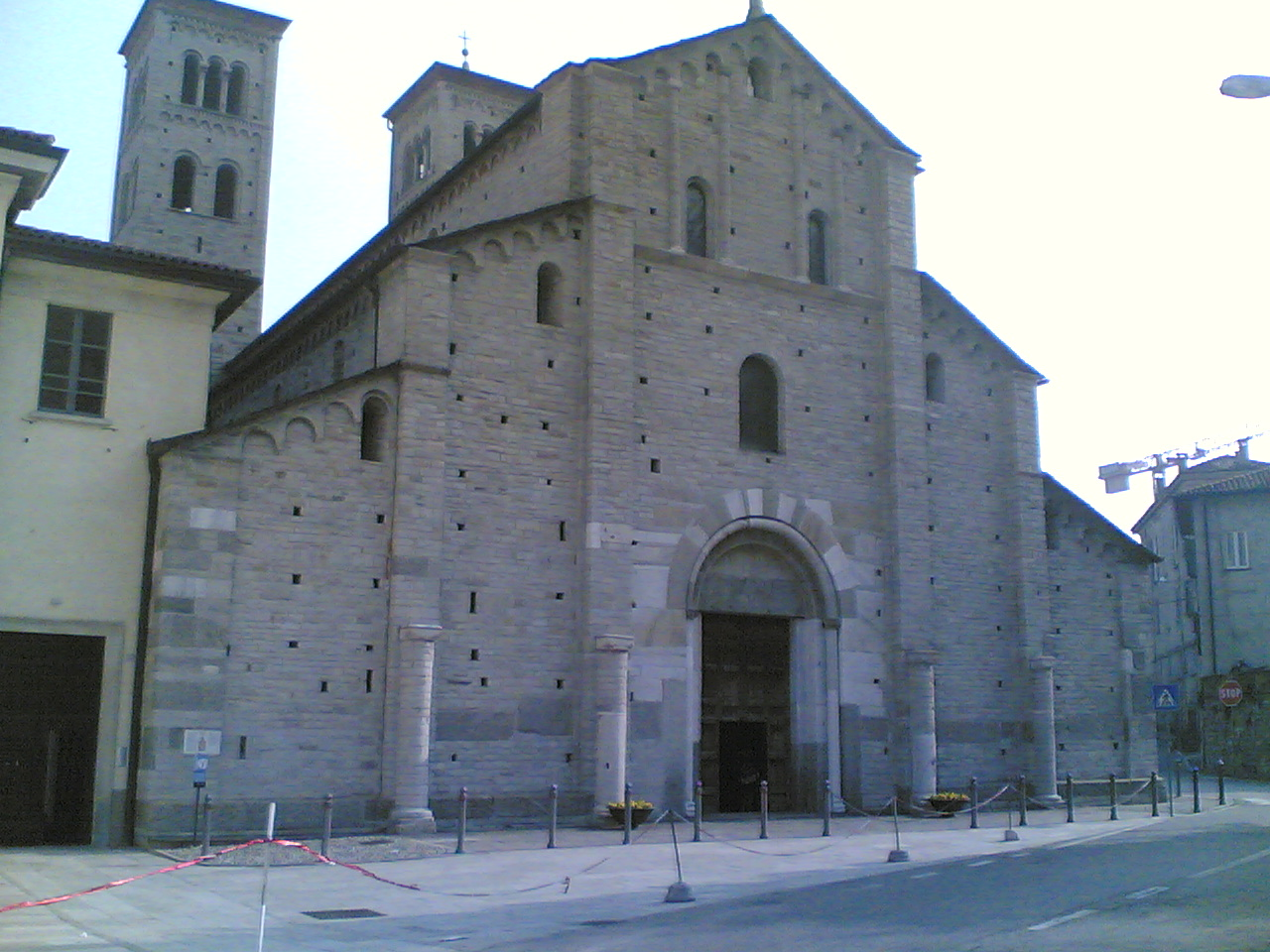 Facciata della Basilica di Sant'Abbondio a Como.